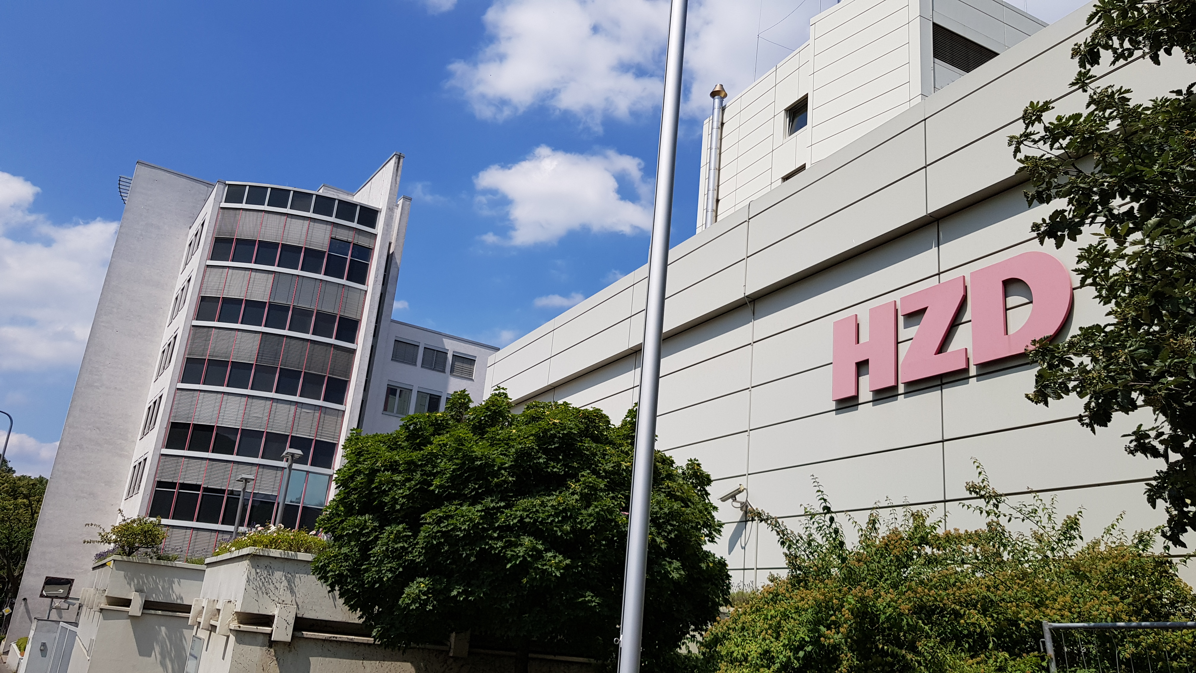 Der Hauptstandort der Hessischen Zentrale für Datenverarbeitung in Wiesbaden.